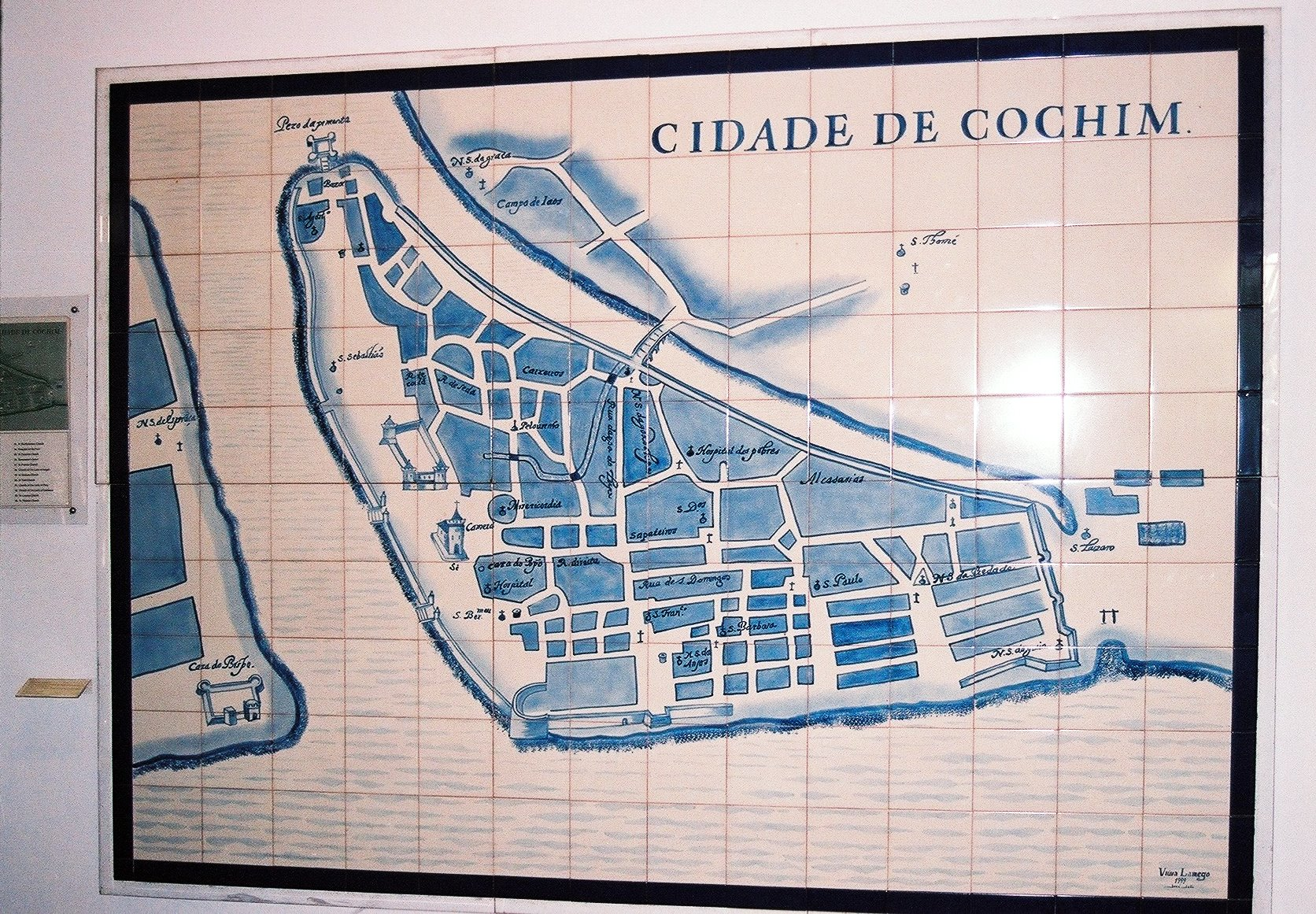 historischer Stadtplan der 'Cidade de Cochim' im Indo-Portugiesischem Museum in Kochi